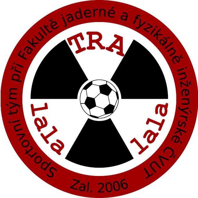 Logo sportovního spolku